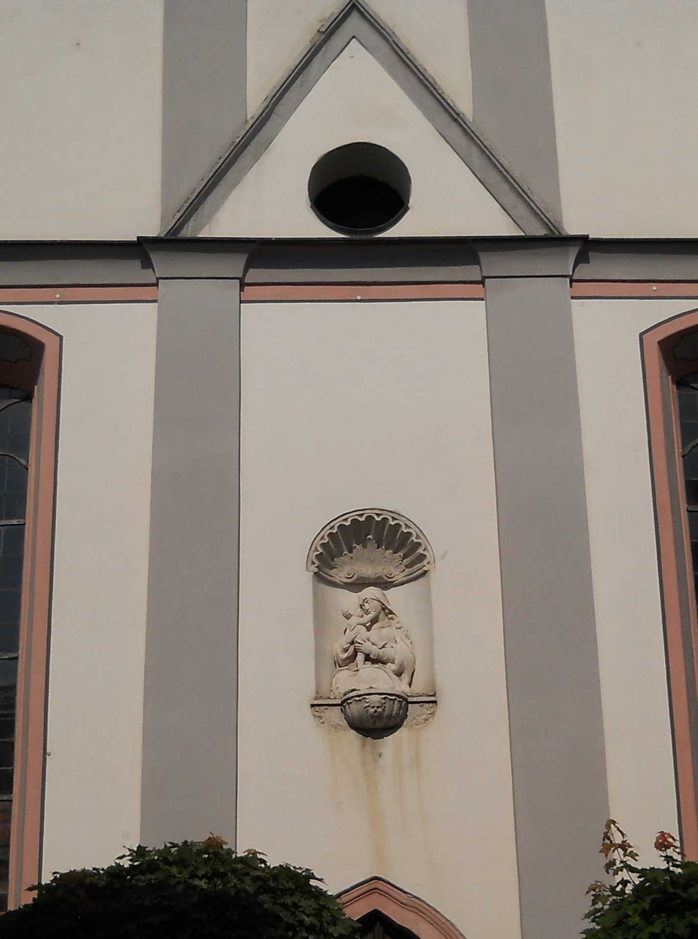 Eichstätt, barocke Mariahilf-Kapelle, Fassadendetaill